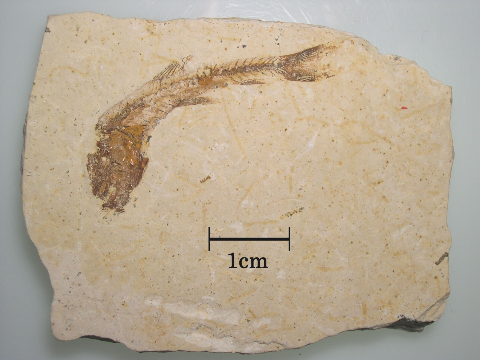 Dastilbe (fossil)